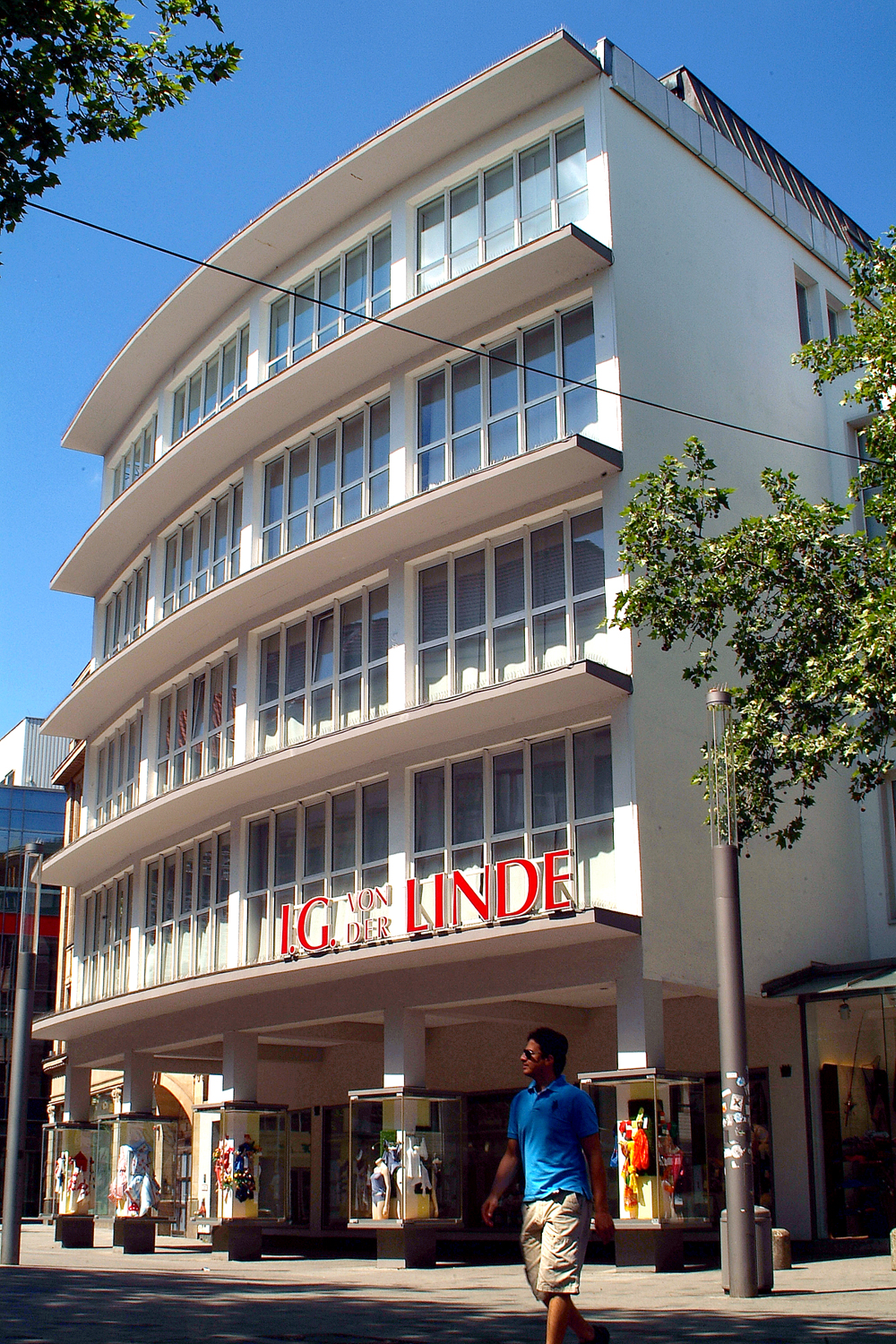 Das Mode- und Wäsche-Kaufhaus I. G. von der Linde in Hannover; Blick am Pfingstmontag auf die abgerundete Front in Richtung Osterstraße